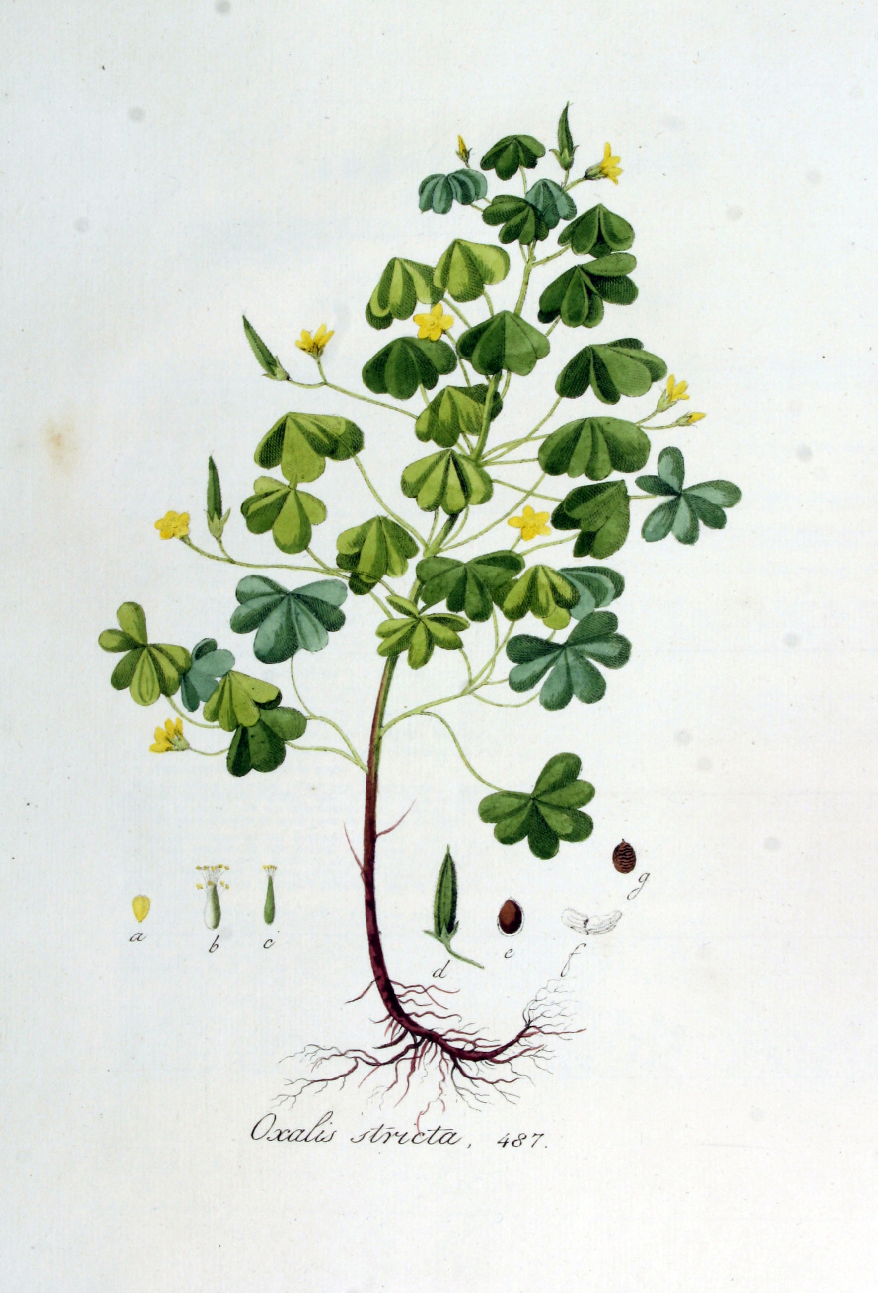 Oxalis stricta L., nom. rejic. propos. (Syn. Oxalis fontana Bunge)